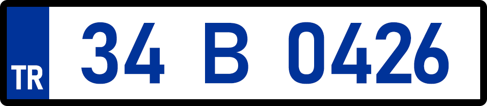 نمونه پلاک ترکیه